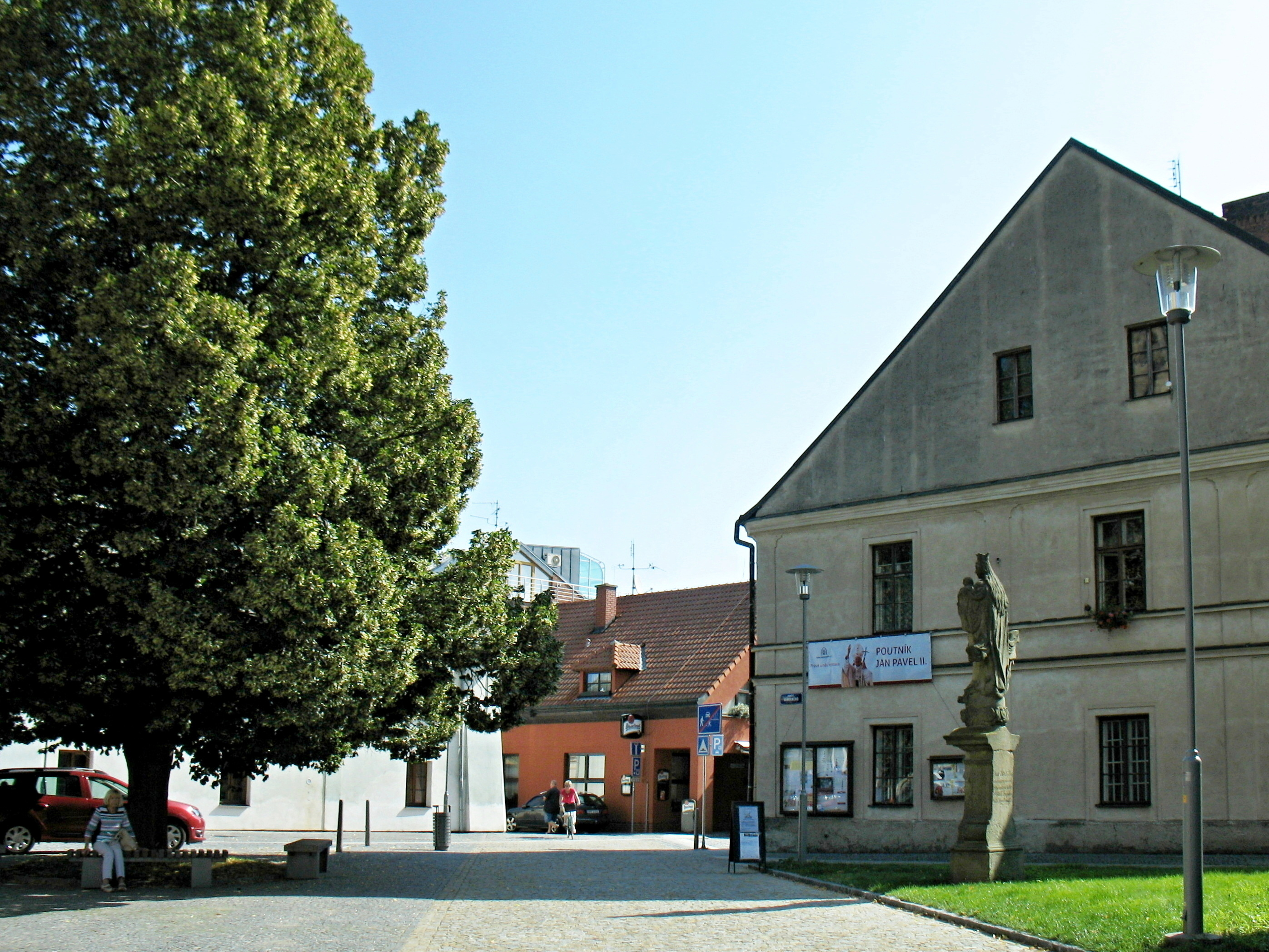 Socha Knířovské madony na náměstíčku u kostela sv. Vavřince ve Vysokém Mýtě